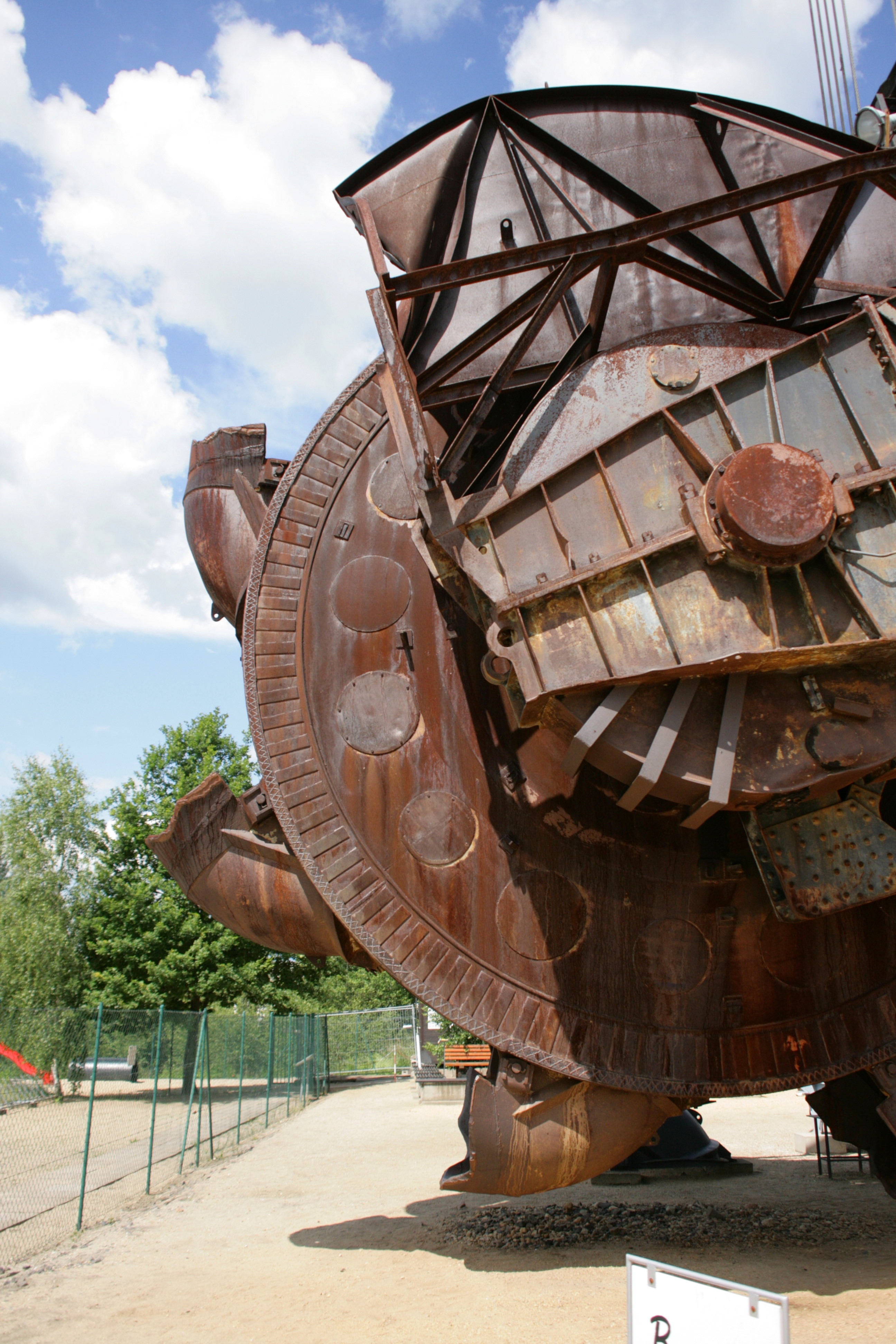 Schaufelradbagger 1452 im Museum “Bagger 1452”, Berzdorfer Straße 102 in Görlitz